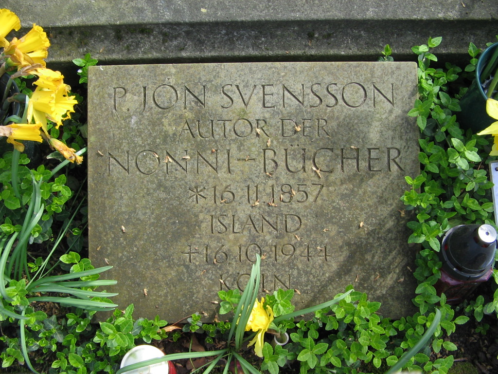 Grabstein des isländischen Schriftstellers Jón Sveinsson auf dem Melaten-Friedhof in Köln